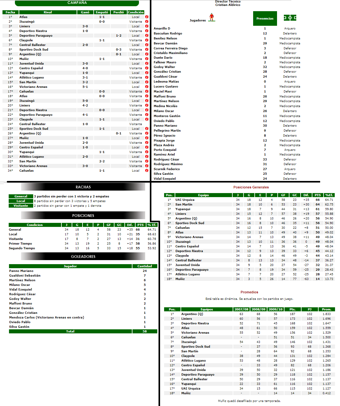 uai urquiza campeon